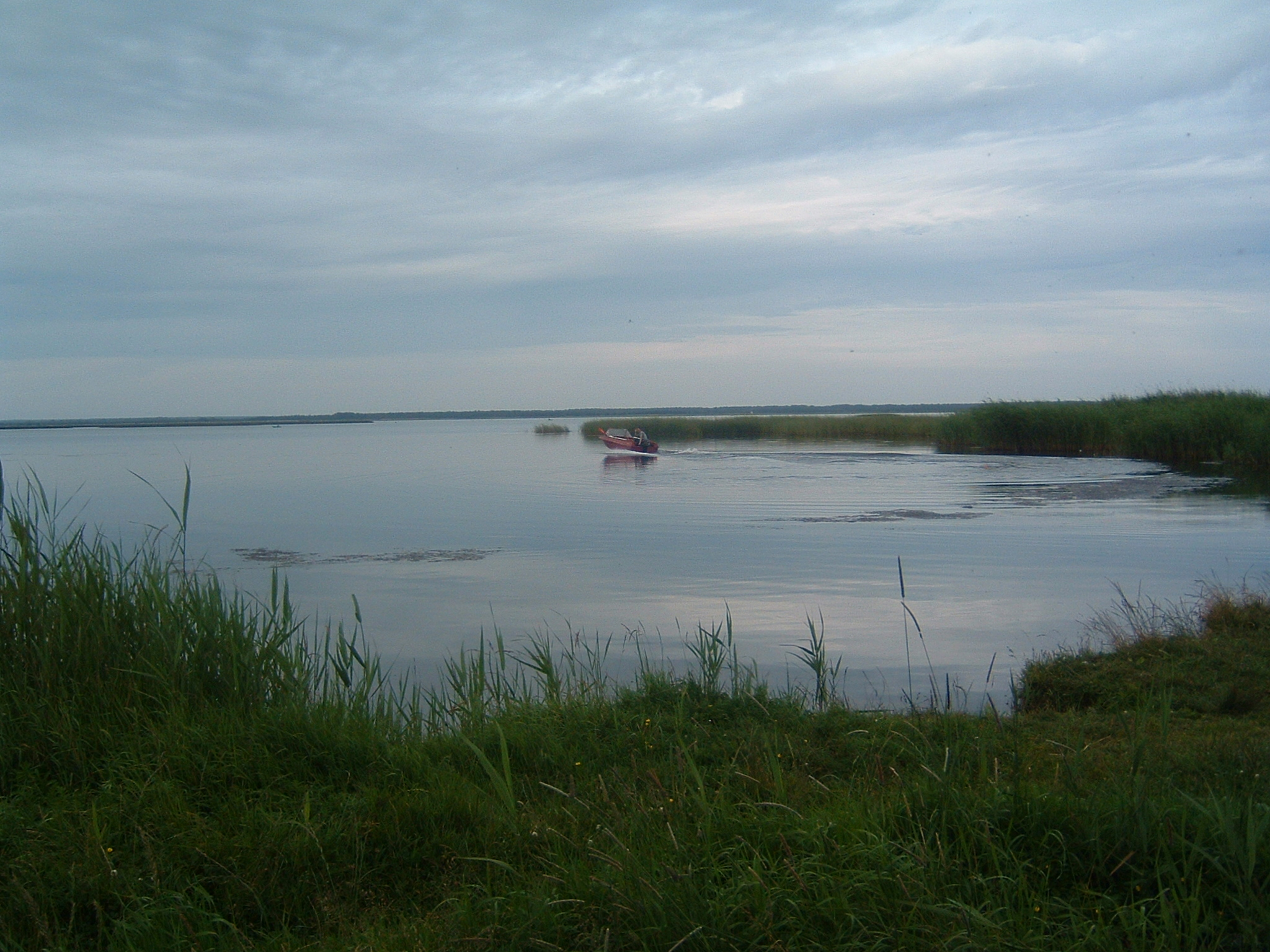 Lake From E2